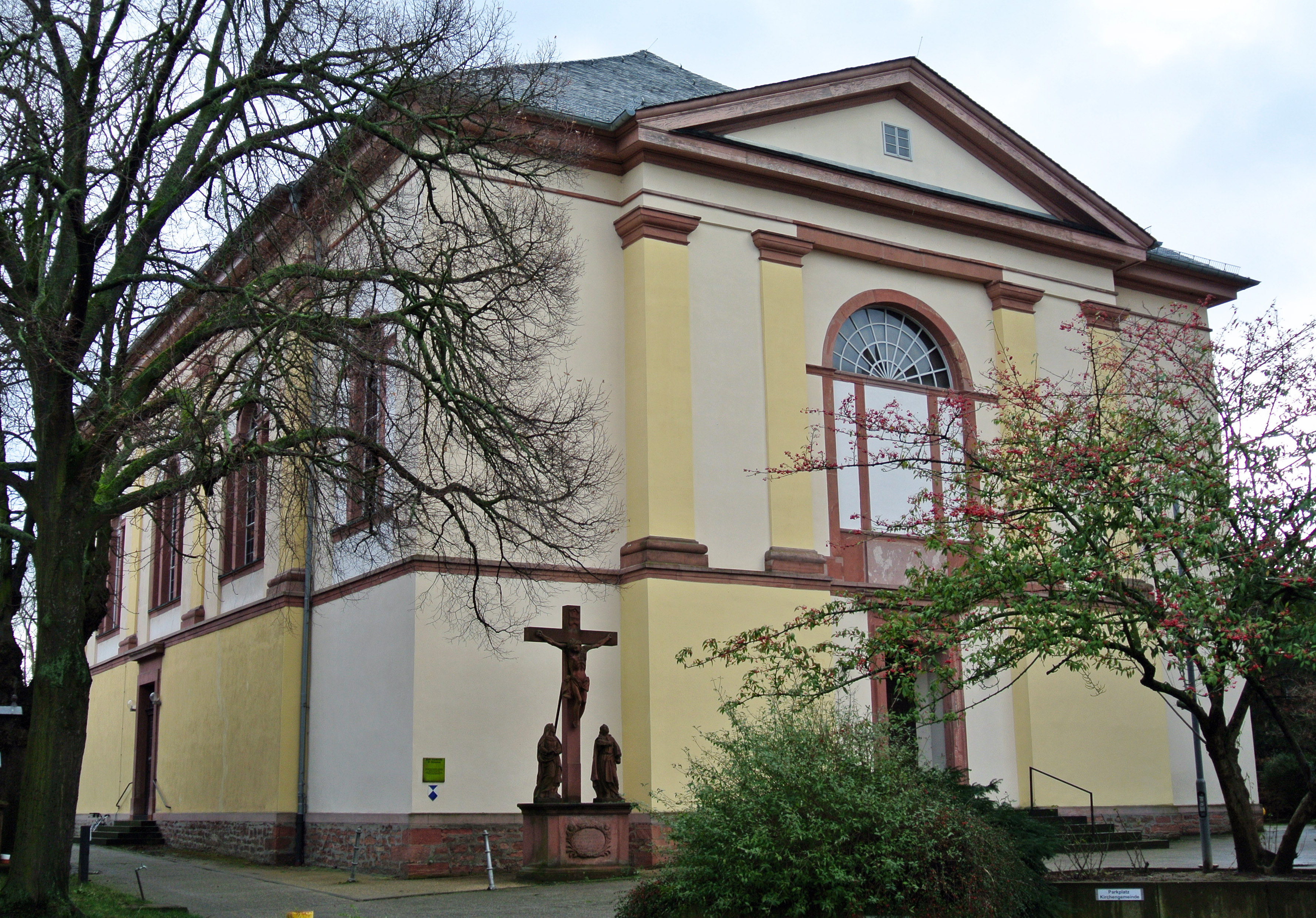 Katholische Kirche St. Dionysius in Frankfurt-Sindlingen, Huthmacherstraße 17, Bauzeit: 1823-1827; klassizistische Kirche von Carl Florian Goetz; Baudenkmal, Ansicht von Nordwesten